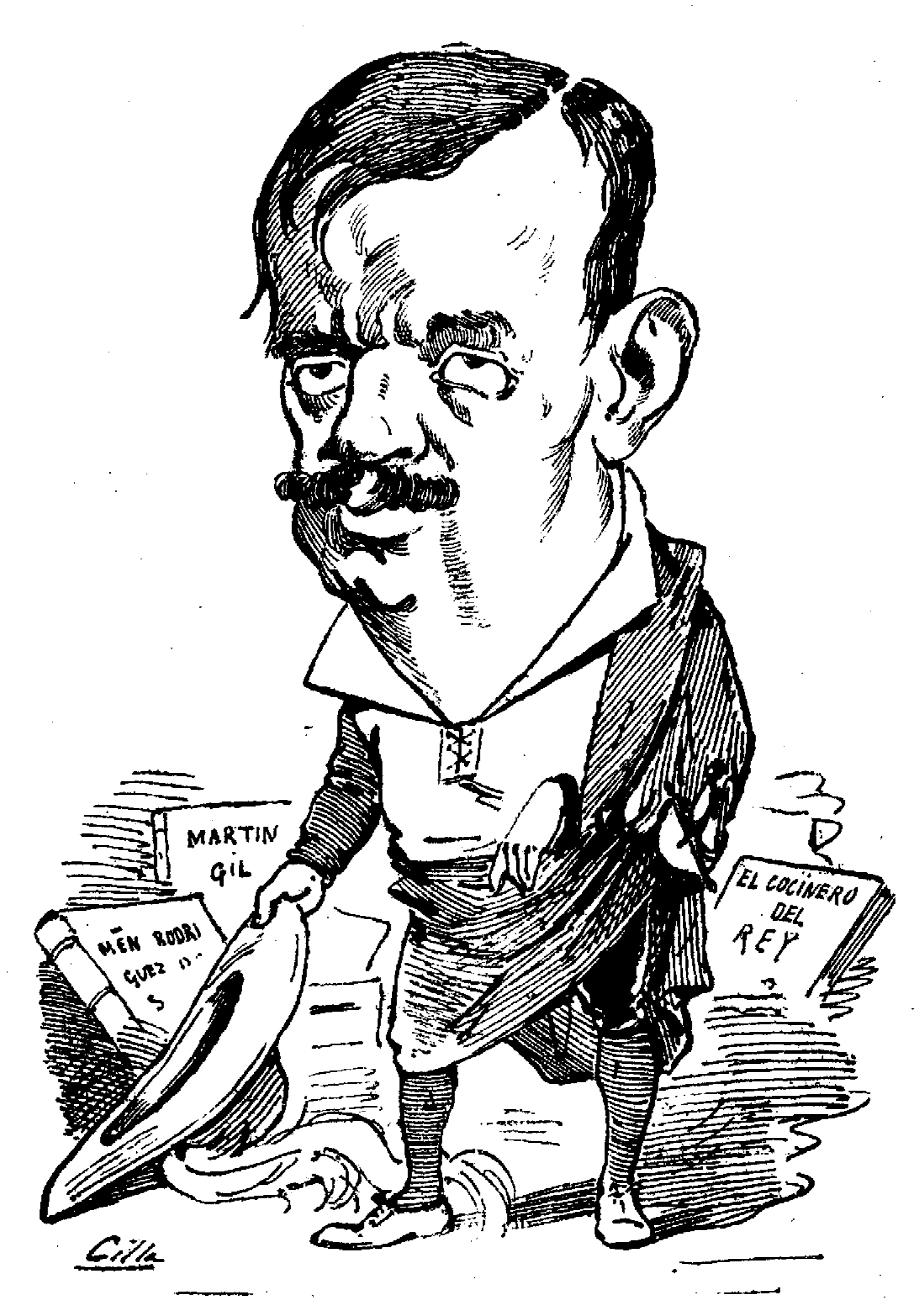 Manuel Fernández y González.